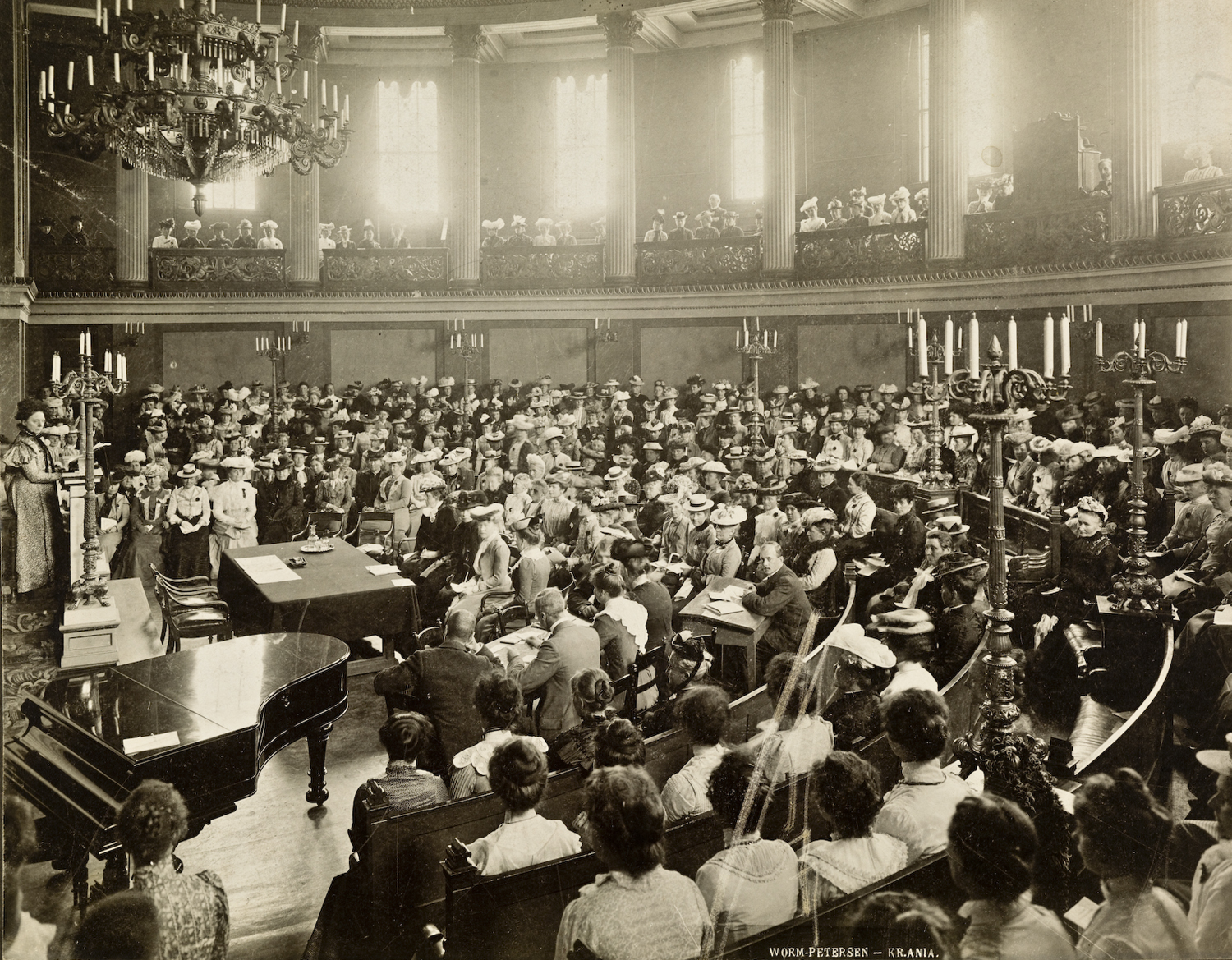 Bilde fra Gamle festsal i 1902. Tatt under Det nordiske kvinnesaksmøte 3. -7. Juni 1902. Møtet hadde 500 deltakere og ble holdt i Universitets gamle festsal. Fredrikke Marie Qvam på talerstolen. Fotograf: Severin Worm-Petersen. RA, PA-00379 Norske Kvinners Sanitetsforening, U29_3598. Fra Riksarkivet.